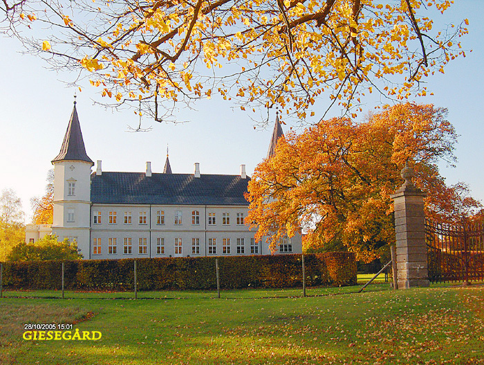 fra øst